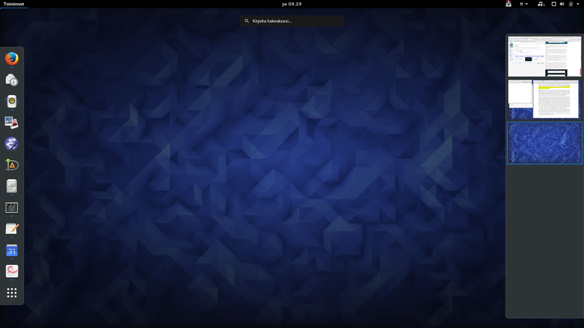 Fedora 23 vakiotyöpöytä GNOME 3.18 hakunäkymässä, kolmen virtuaalityöpöydän ja suosikkisovellusten ollessa näkyvillä.